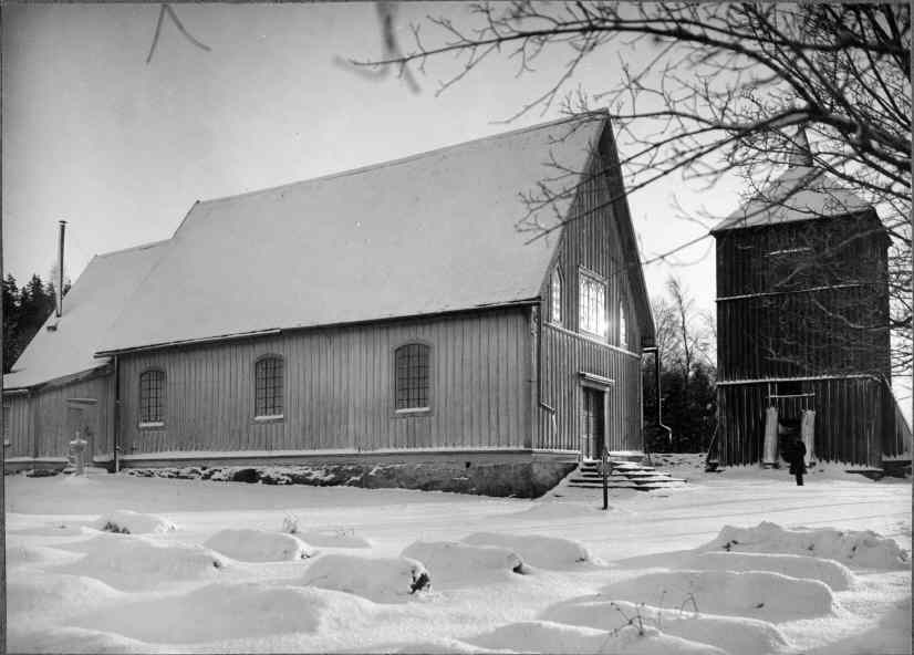 Kyrkan och klockstapeln mot norr.